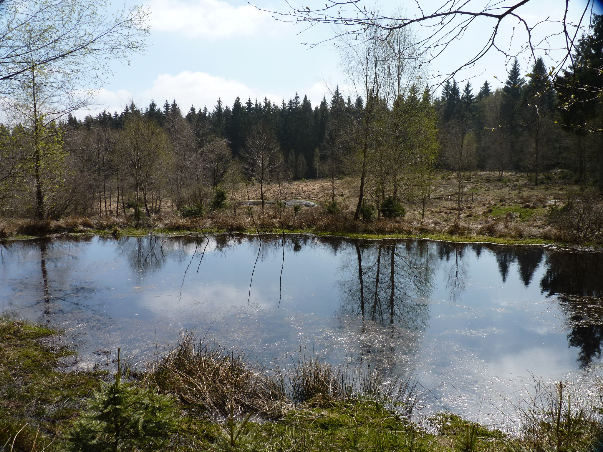 Einer von vielen mit Wasser gefüllten Kratern nahe der Eisenstraße, die das Regionalforstamt Siegen-Wittgenstein in den 80ern zum Zwecke des Naturschutzes in den Boden sprengen ließ